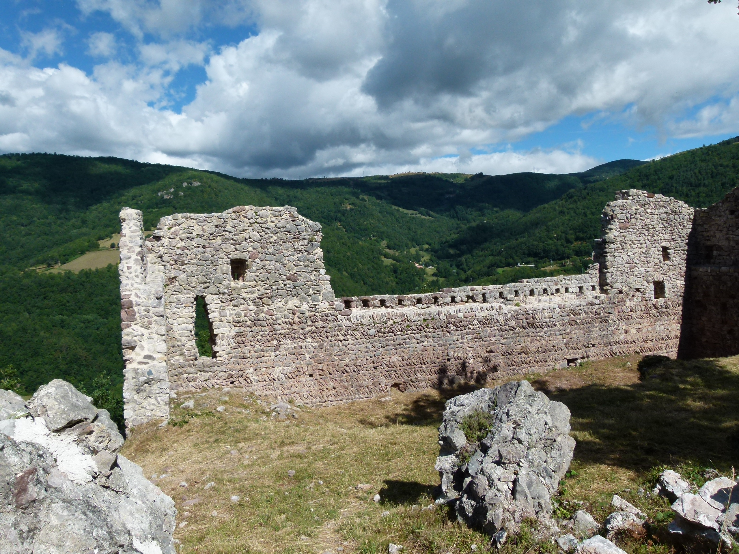 Castell de Rocabruna (Camprodon)